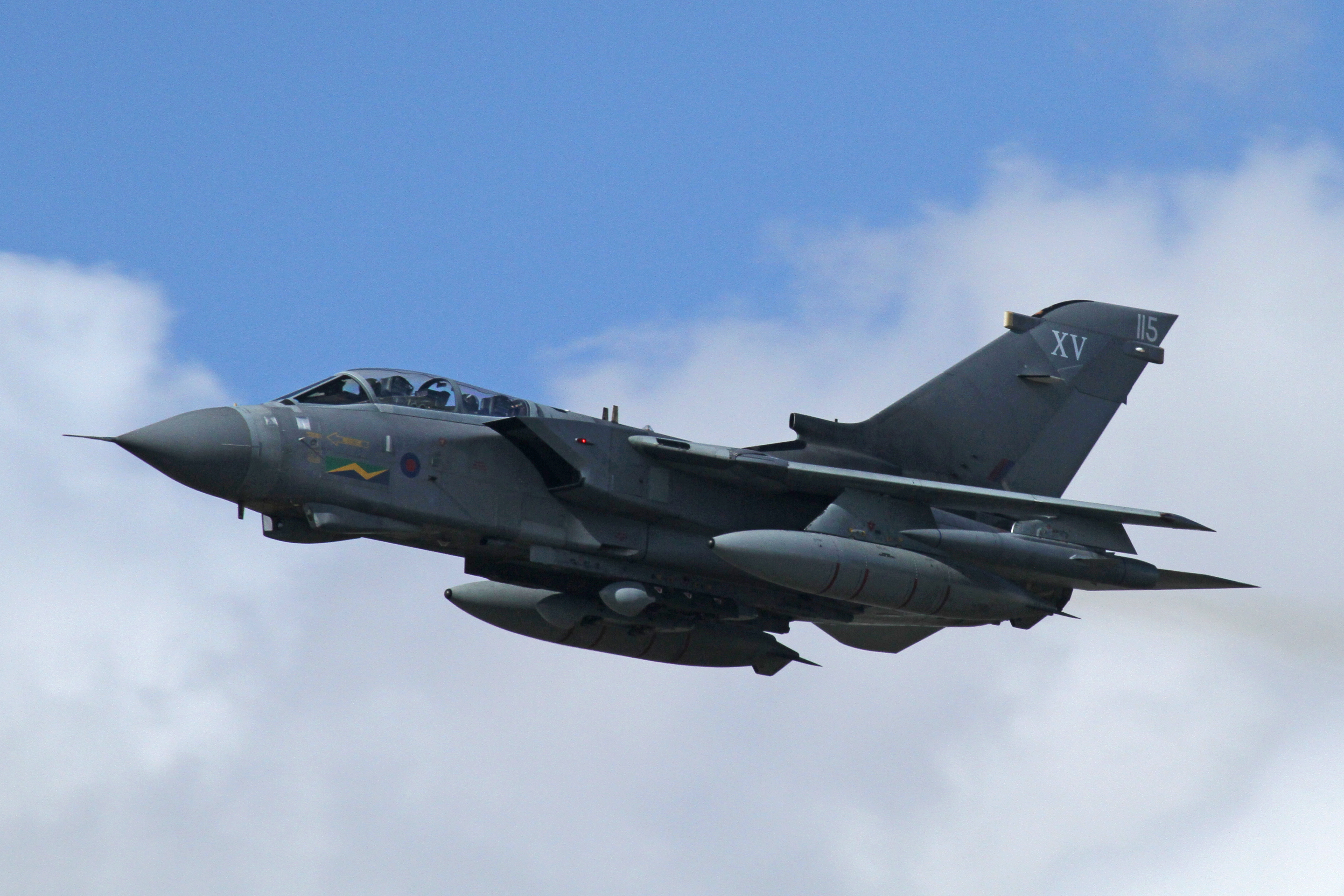 Panavia Tornado GR4 05